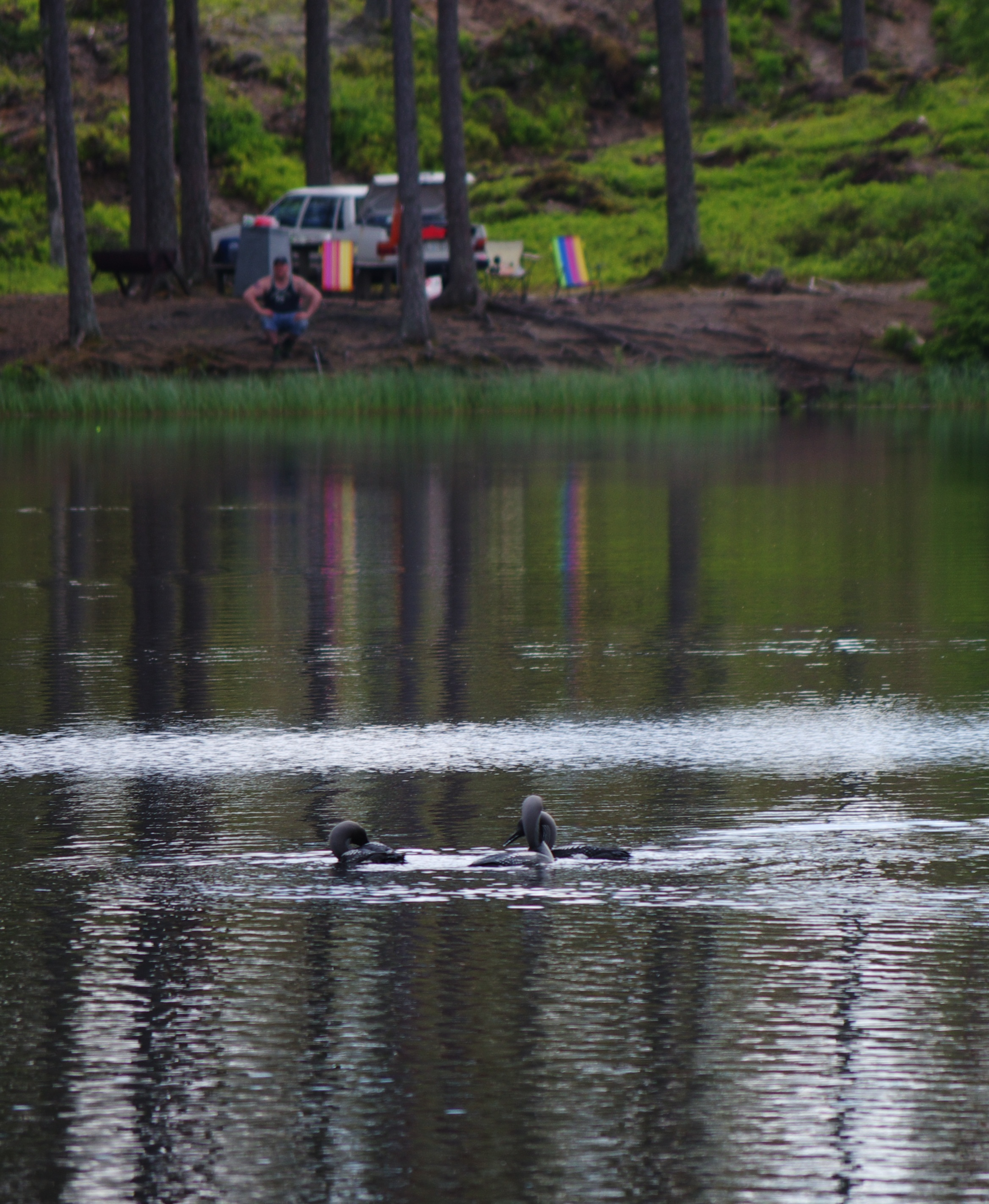 Kroksjön på Hökensås i Tidaholms kommun i Västergötland, Sverige. Sjön är en fiskesjö med häckande storlom i sjöns närhet.